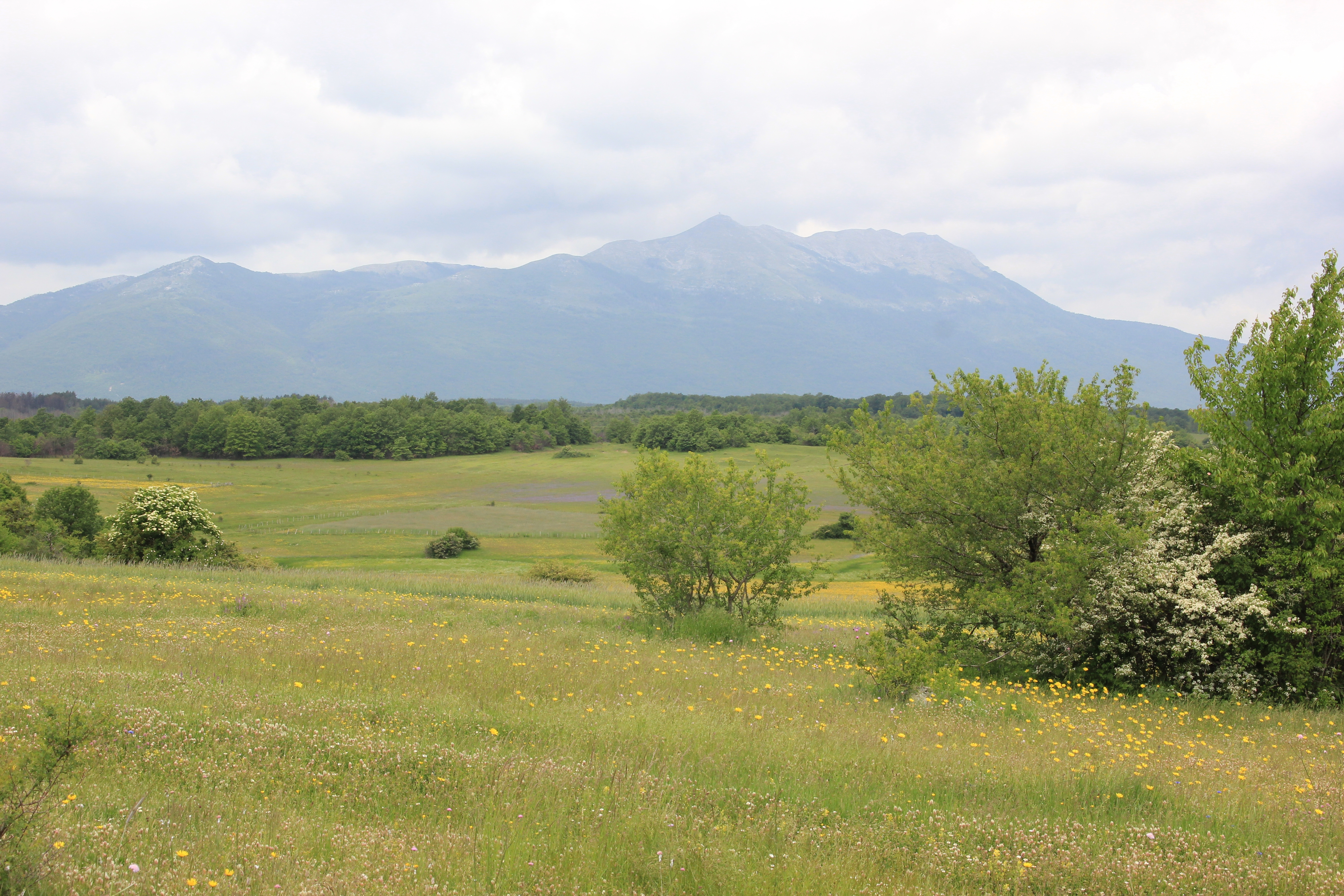 Das Nevesinjsko polje und das Velež-Gebirge im Hintergrund